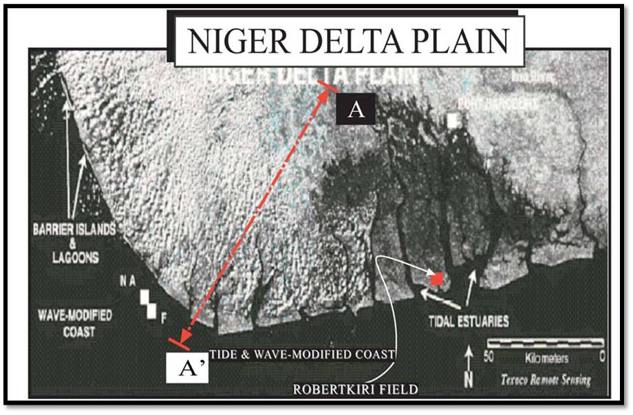 แสดงลักษณะรูปร่างของดินดอนสามเหลี่ยมปากแม่น้ำไนเจอร์นี้ถูกกระทำโดยปัจจัย 3 ประการดังนี้ คือ จากทางน้ำ, จากปรากฏการณ์น้ำขึ้น-น้ำลง และจากคลื่น แต่ปัจจัยที่มีผลมากที่สุดคือปัจจัยที่มาจากคลื่น